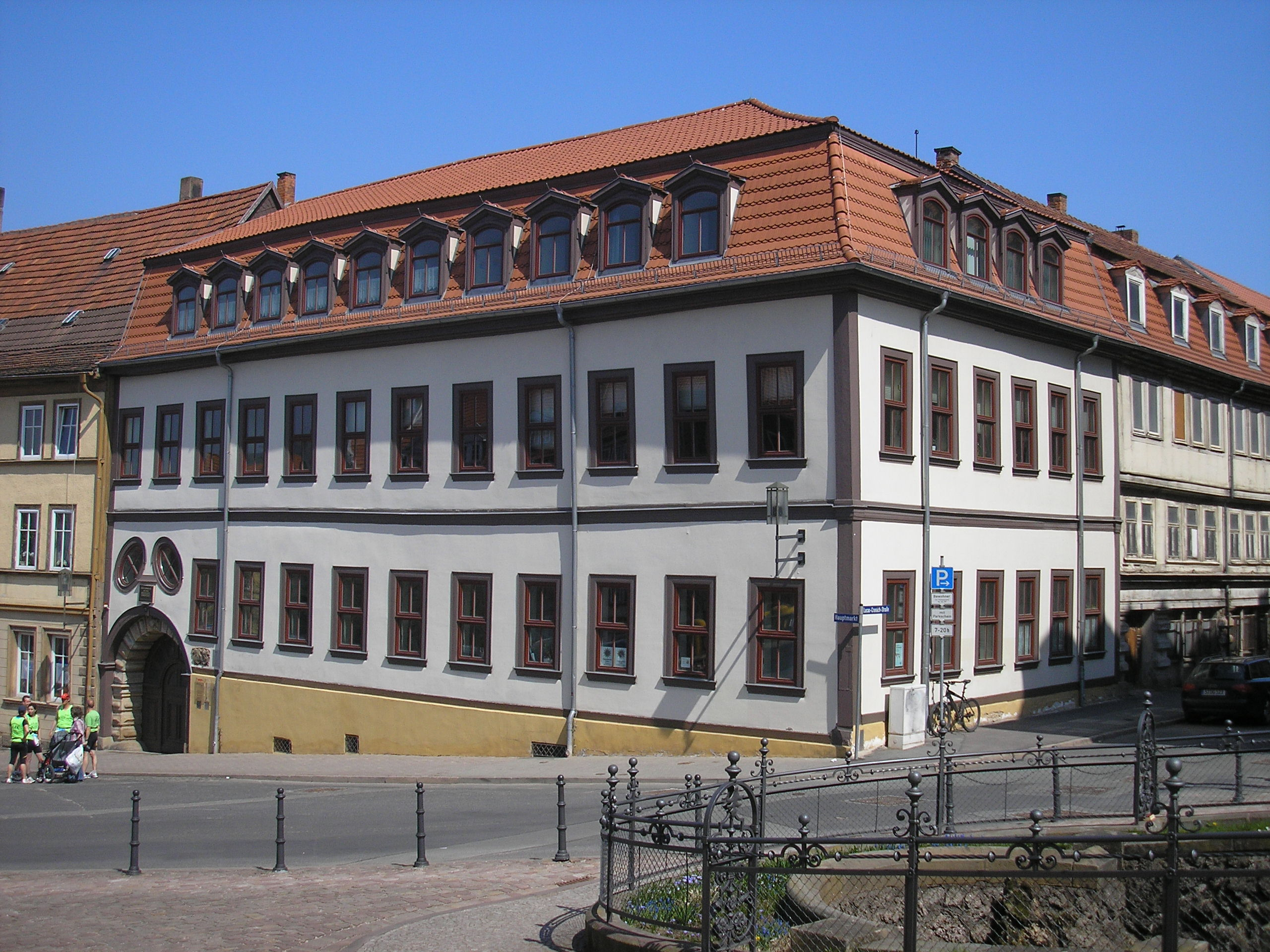 Das Cranachhaus am Hauptmarkt in Gotha (Thüringen).